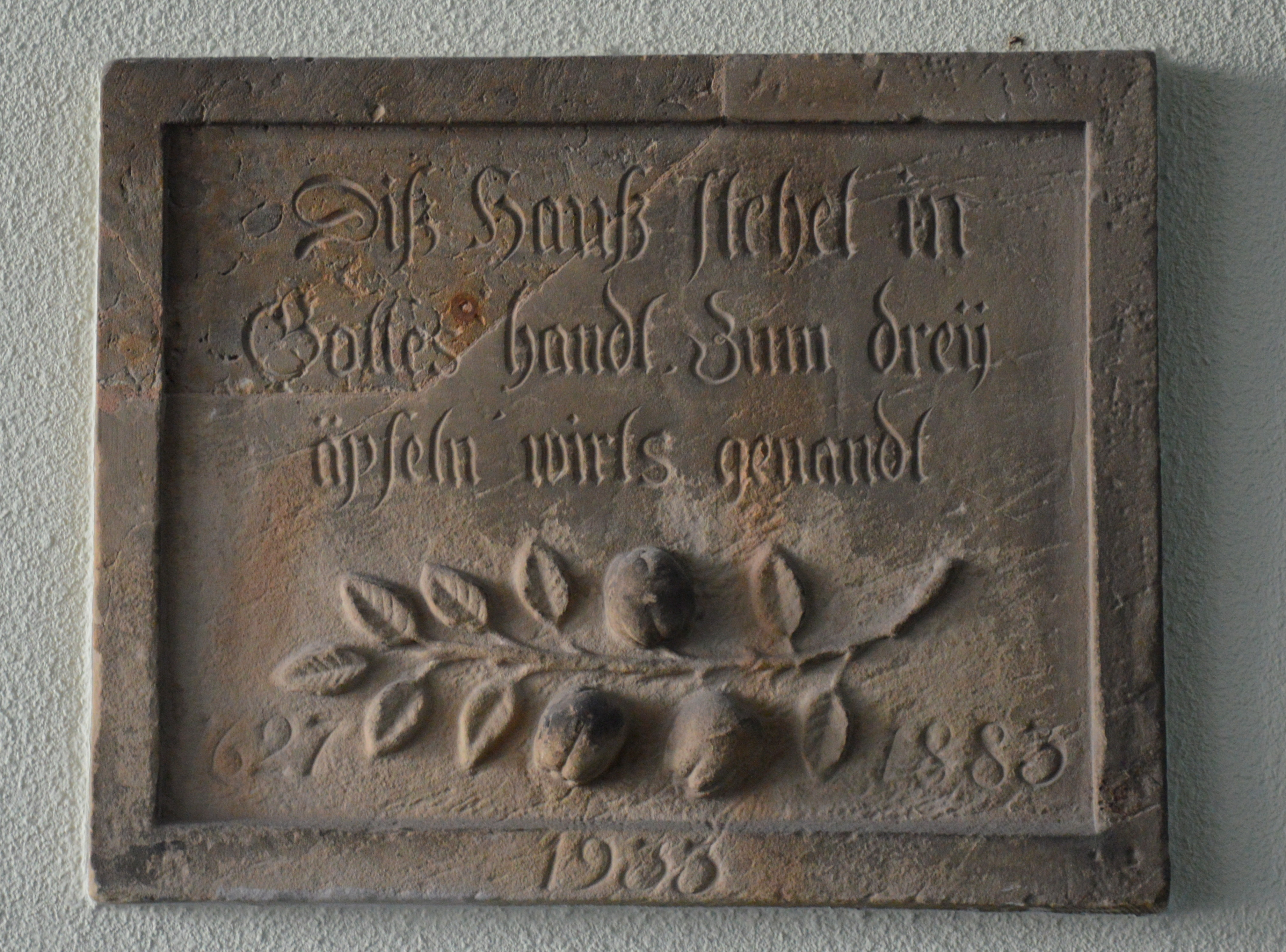 Alter Markt 12, 13 Hauszeichen Magdeburg